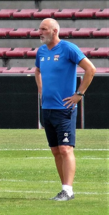 Christophe Gardié en août 2017 dans le staff de l'Olympique lyonnais féminin (entraîneur des gardiennes).